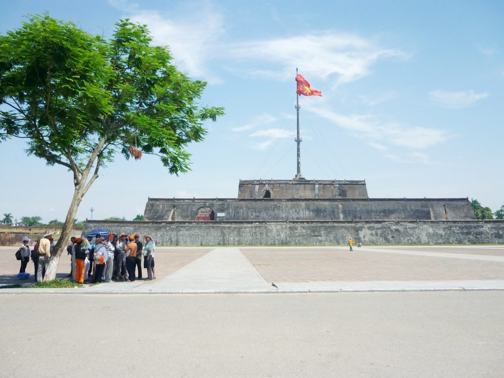 Thể loại:Huế Thể loại:Cột cờ Thể loại:Nhà Nguyễn Thể loại:Du lịch Huế Thể Loại:Di tích cố đô Huế